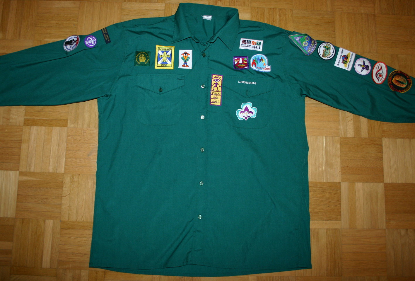 LGS Uniform.